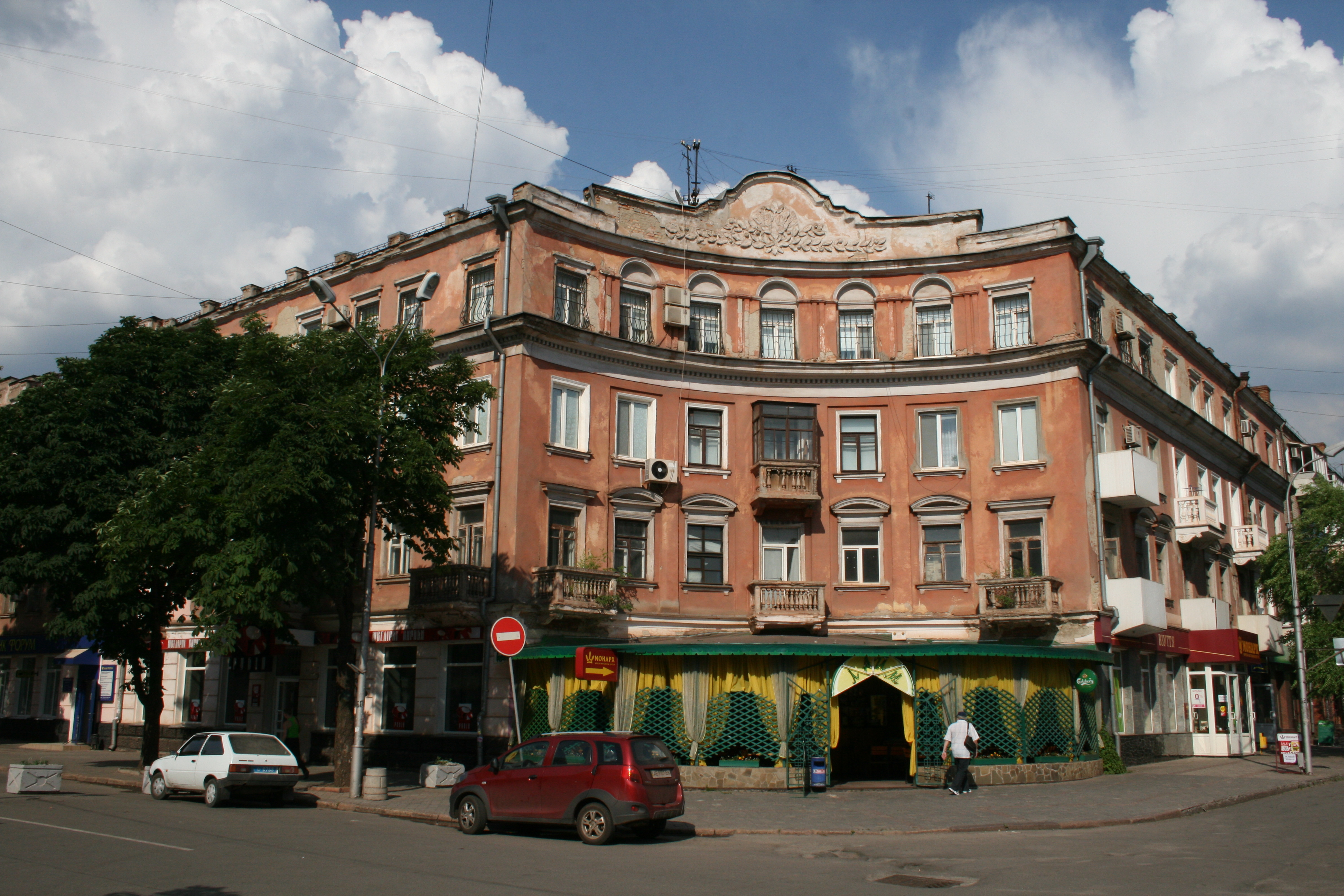 Кривий Ріг, проспект Карла Маркса, 16, Житловий будинок (будинок тресту "Дзержинськруда"), вигляд з перетину вулиць Карла Маркса та Жовтневої